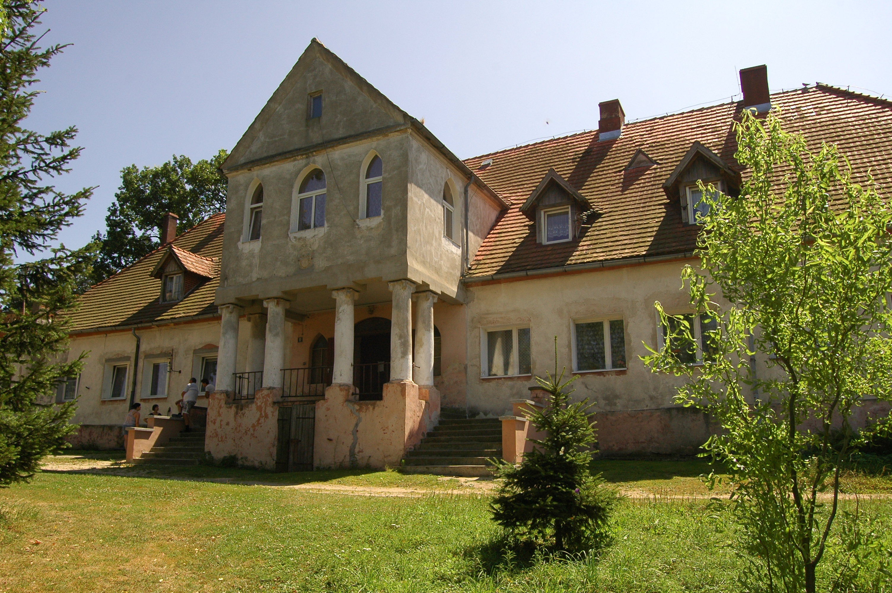 Dwór w Sarbach